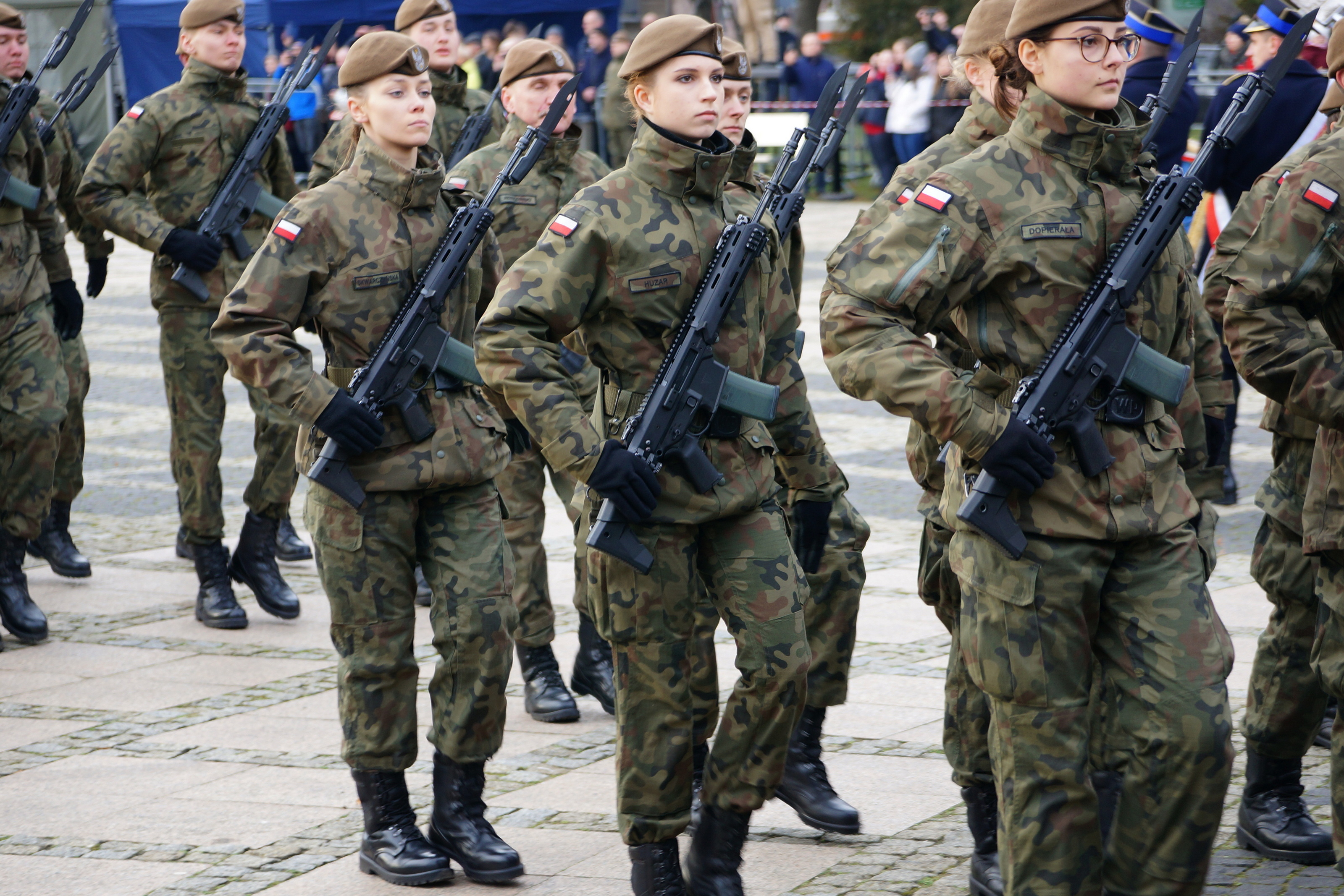 Karabinek MSBS Grot 5,56 na wyposażeniu Wojsk Obrony Terytorialnej